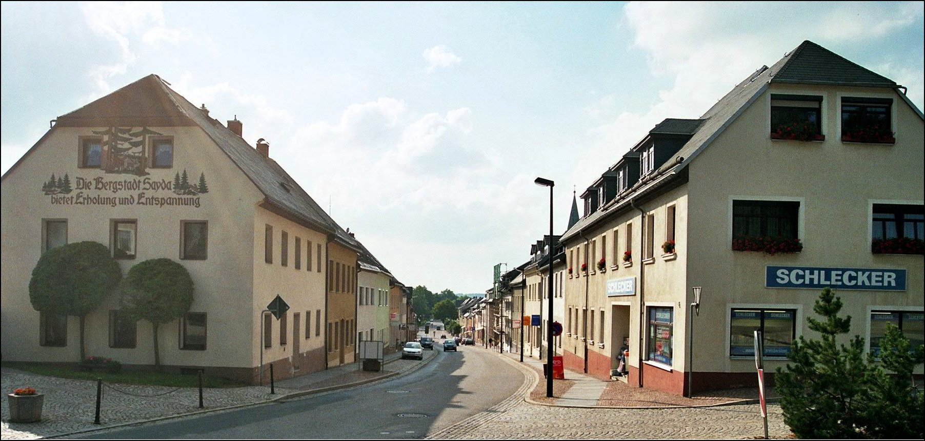 Sayda: Blick in die Dresdner Straße